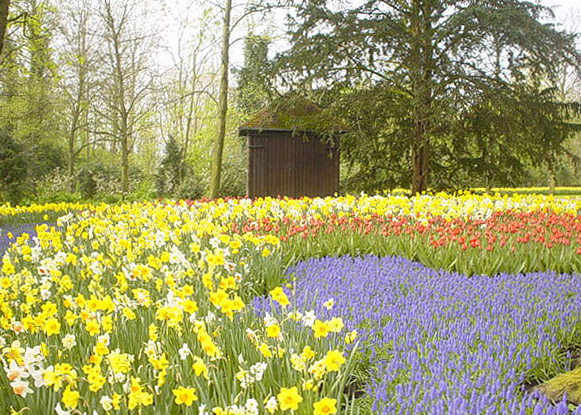 Kuekenhof